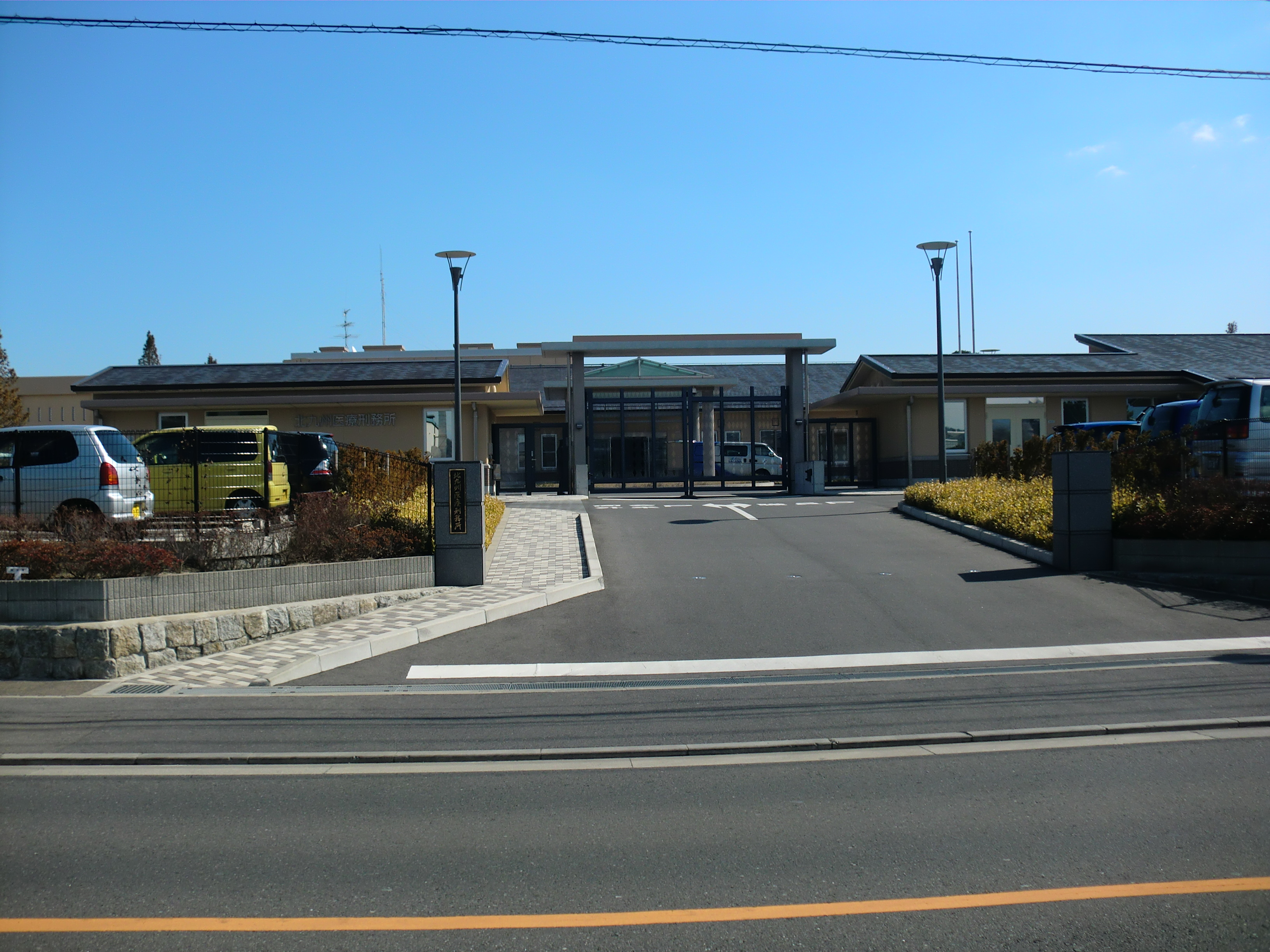 北九州市小倉南区にある北九州医療刑務所